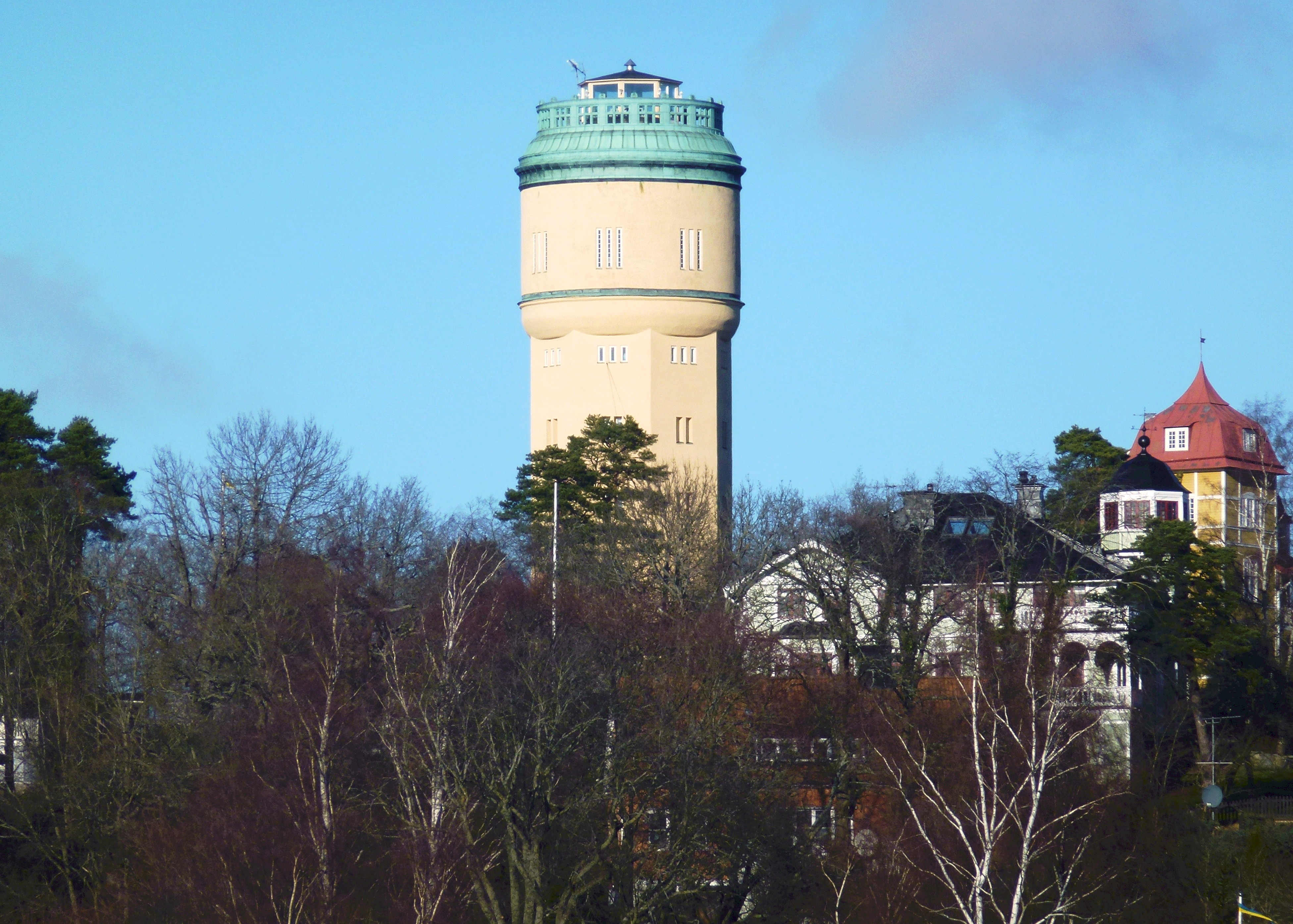 Stocksunds vattentorn, ritat av arkitekt David Lundegårdh (1910)